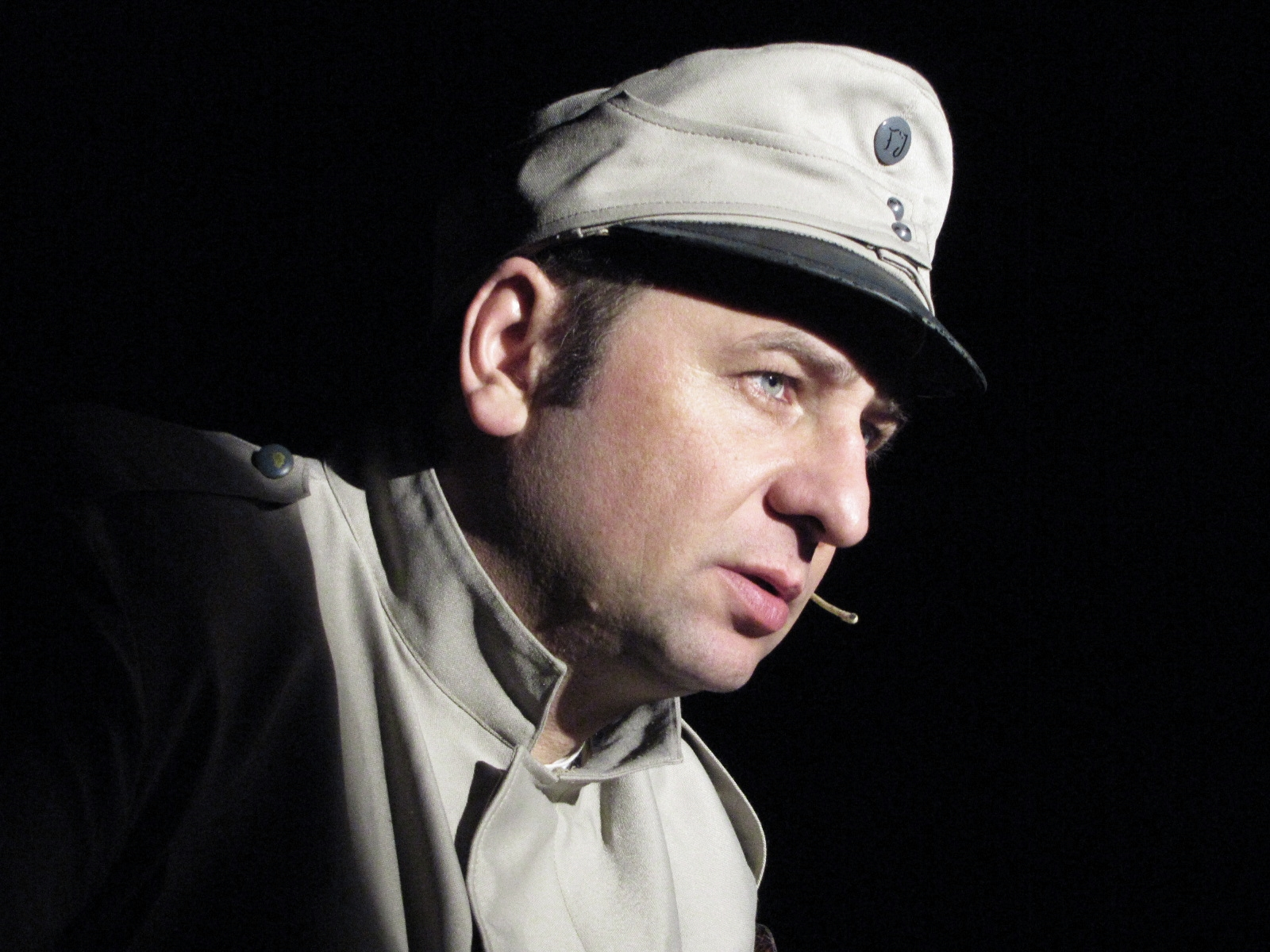 Grzegorz Halama w roli Dobrego Wojaka Szwejka w spektaklu "Szwejk" Teatru Polskiego w Bielsku-Białej